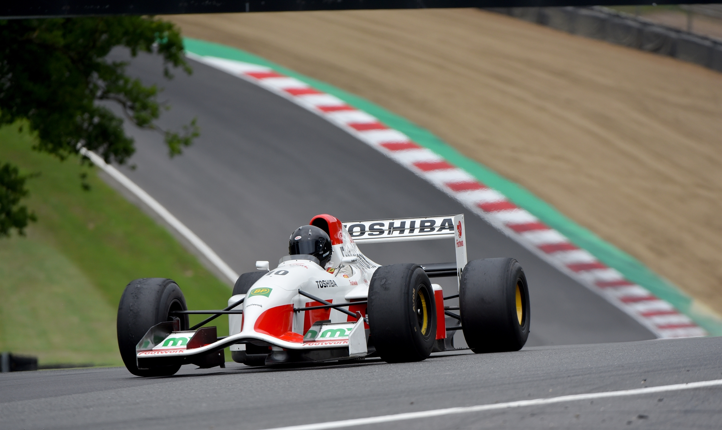 Footwork FA13 Festival Italia 2018 Brands Hatch.